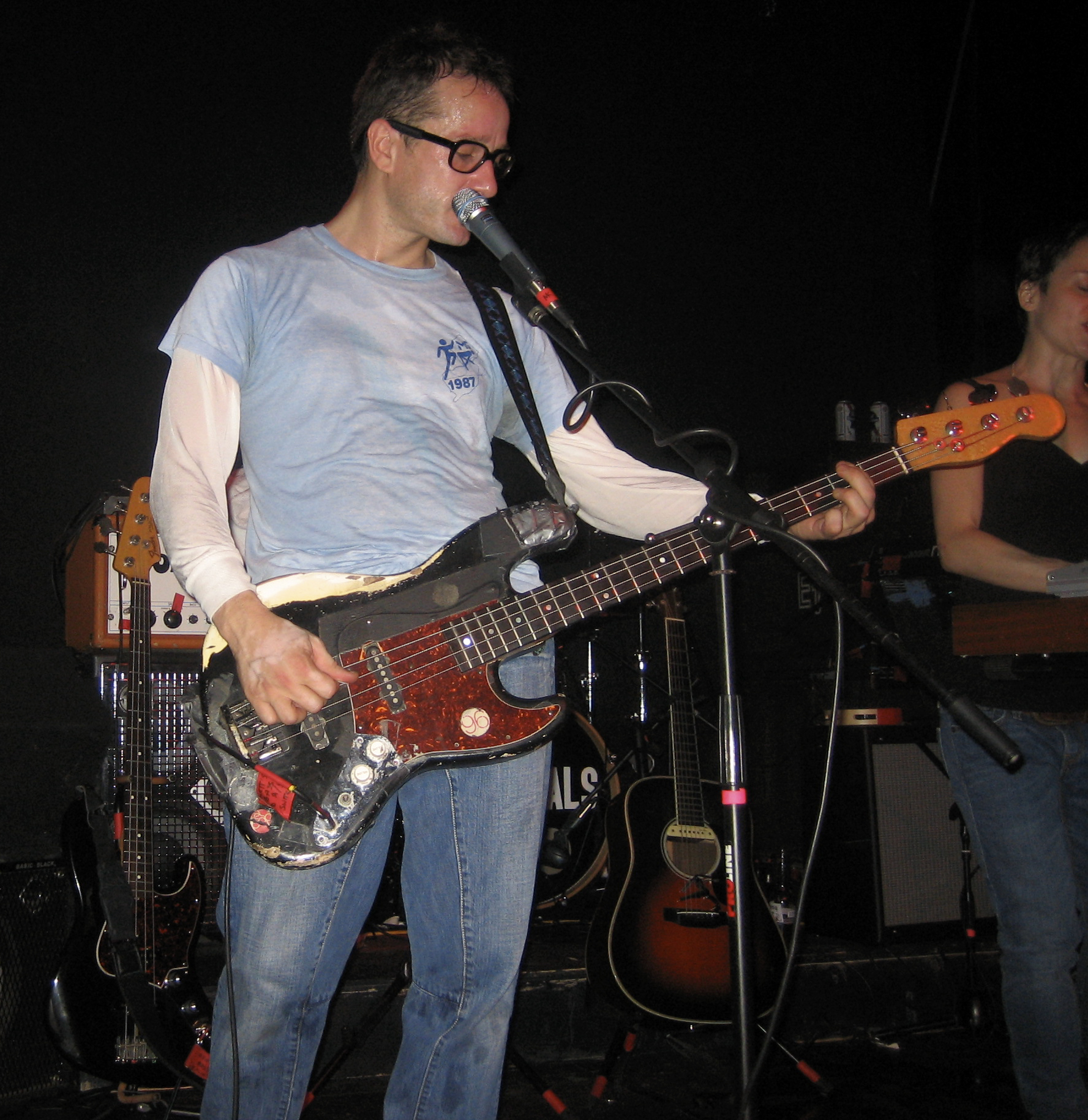 Matt Sharp tijdens een optreden op 12 augustus 2007 in East Side, Milwaukee, Wisconsin